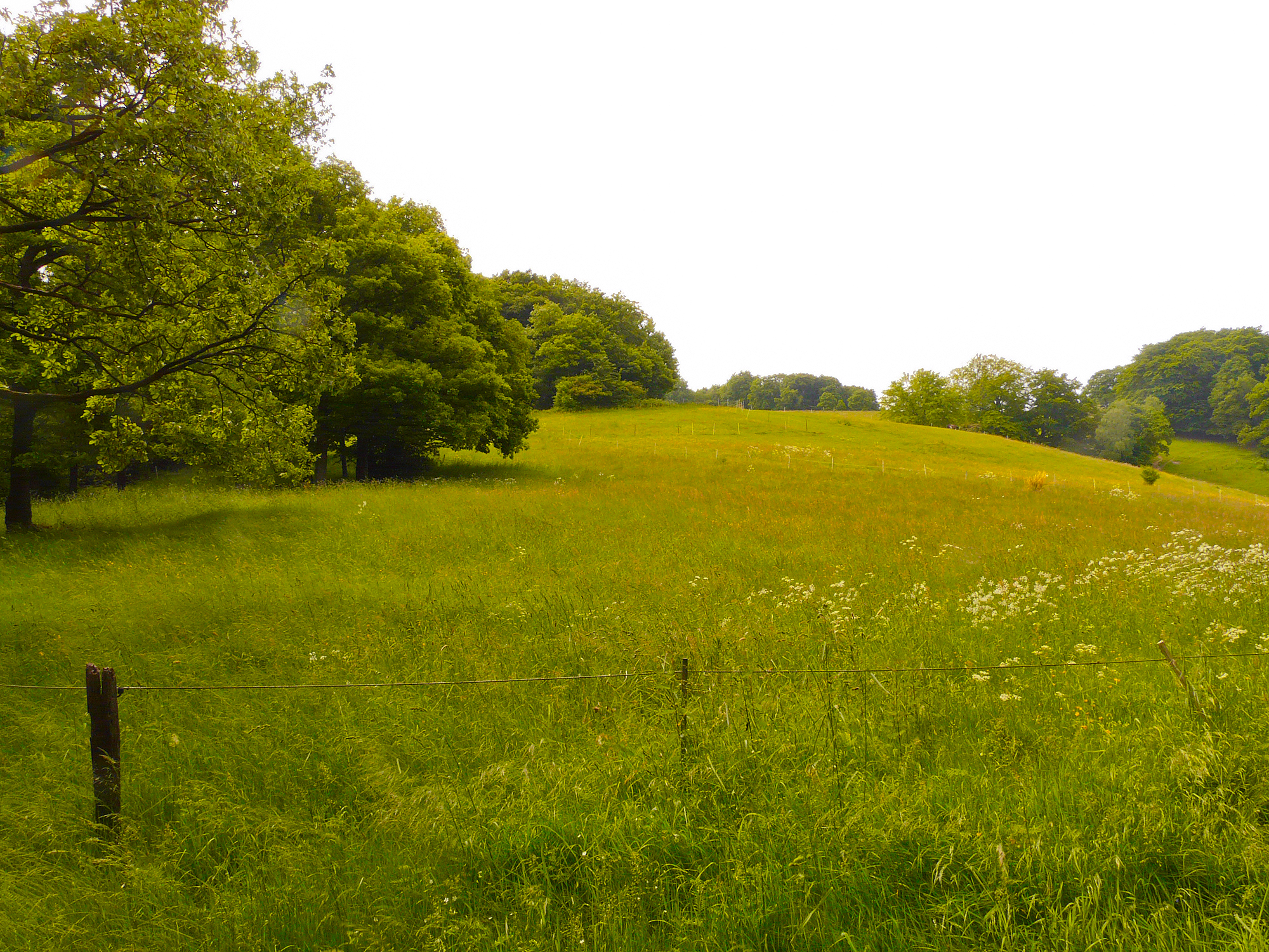 Auf den Höhen des Gevelsberger Stadtwaldes (NSG EN-021) liegen auch einige Wiesengründe